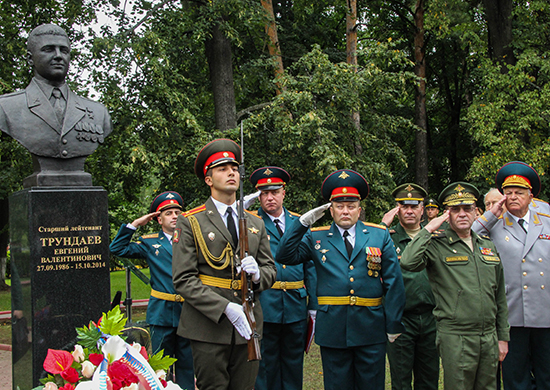 Бюст Евгения Трундаева в Московском ВОКУ